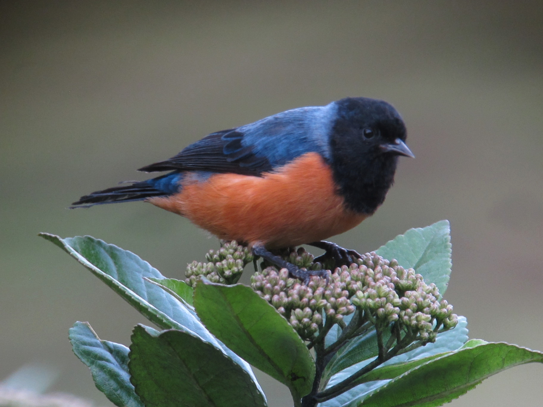 Manizales, Caldas, Colombia